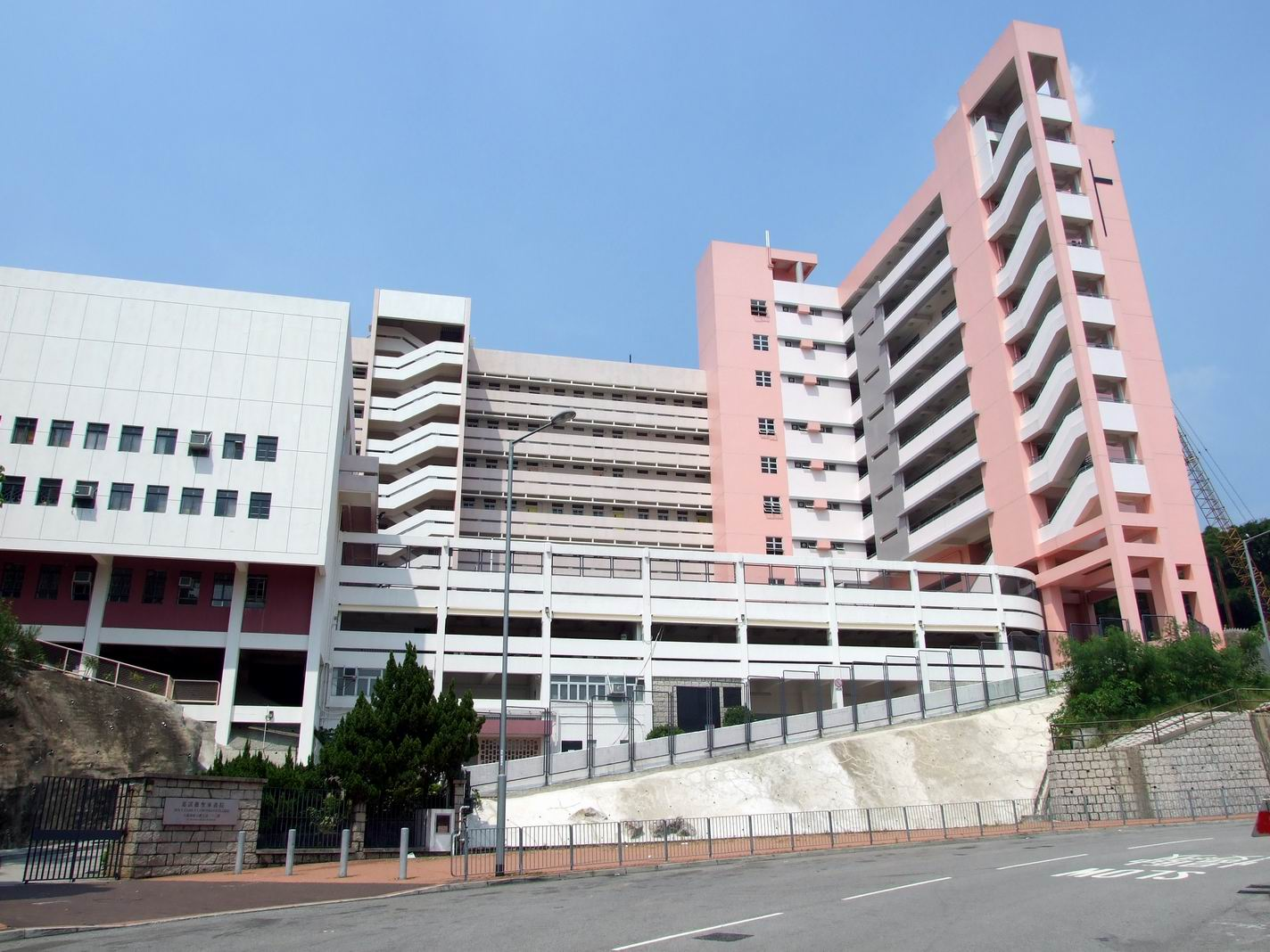 嘉諾撒聖家書院